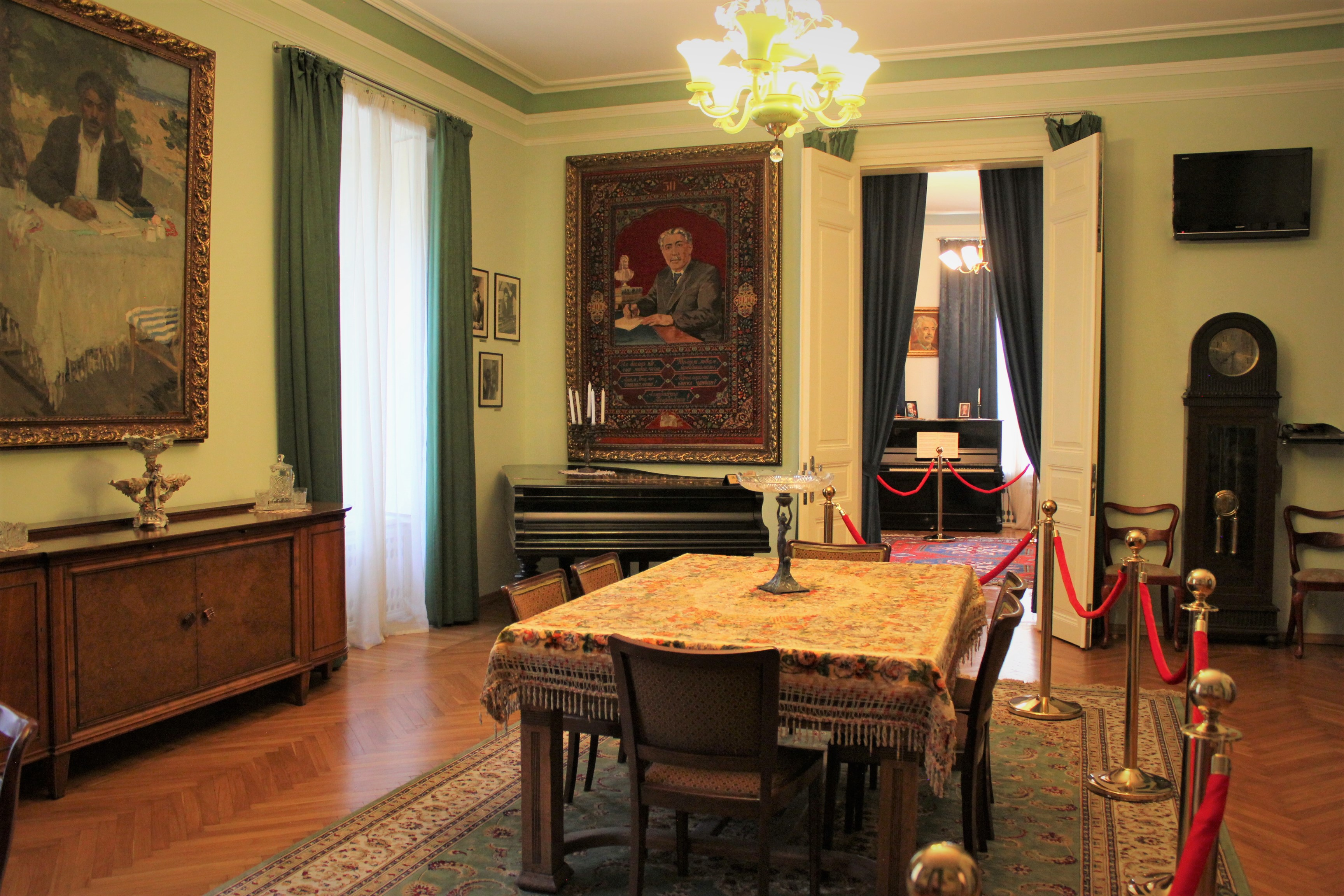 Интерьер гостиной в доме-музее азербайджанского поэта, драматурга, ученого, общественного деятеля Самед Вургуна.